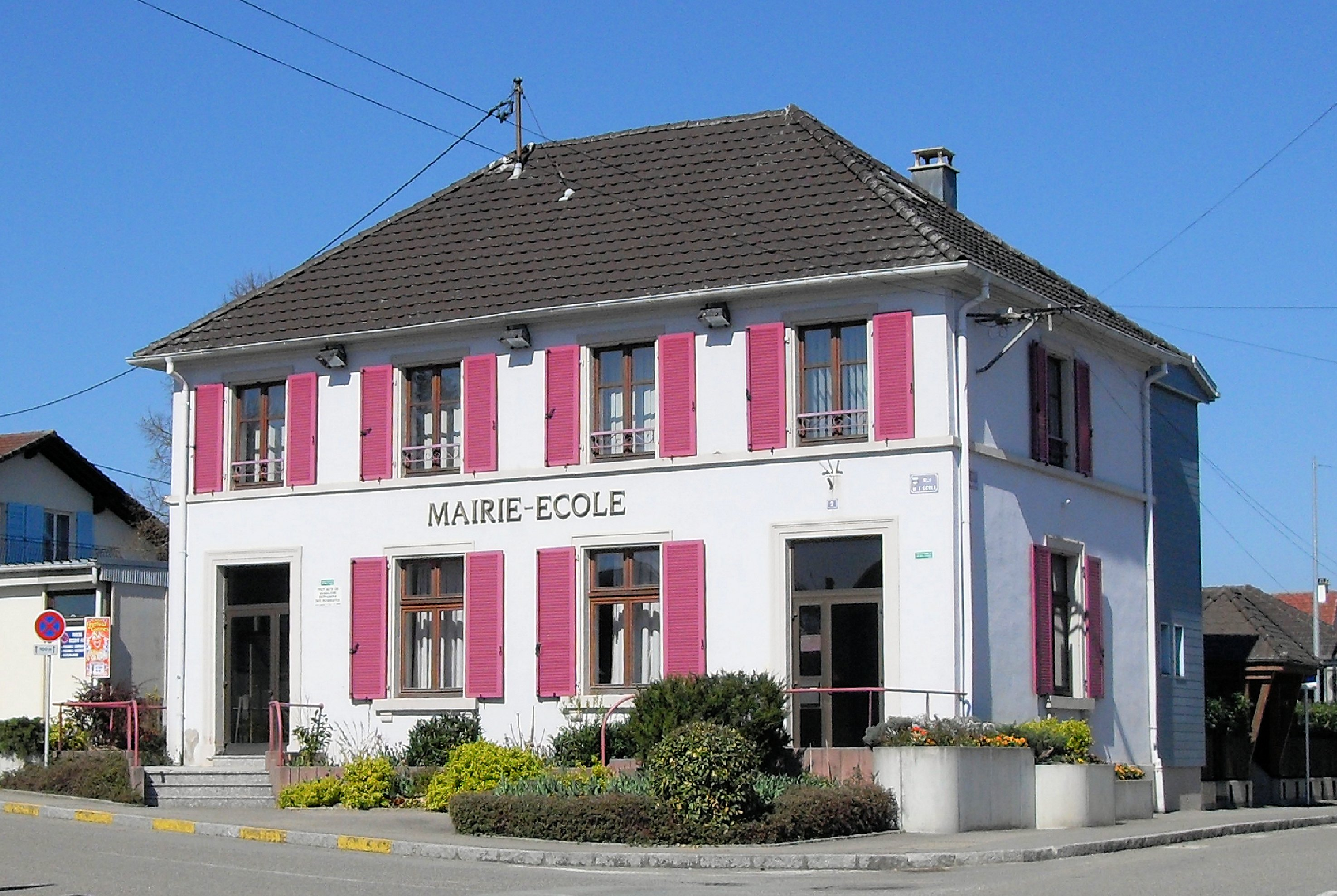 La mairie-école de Hecken